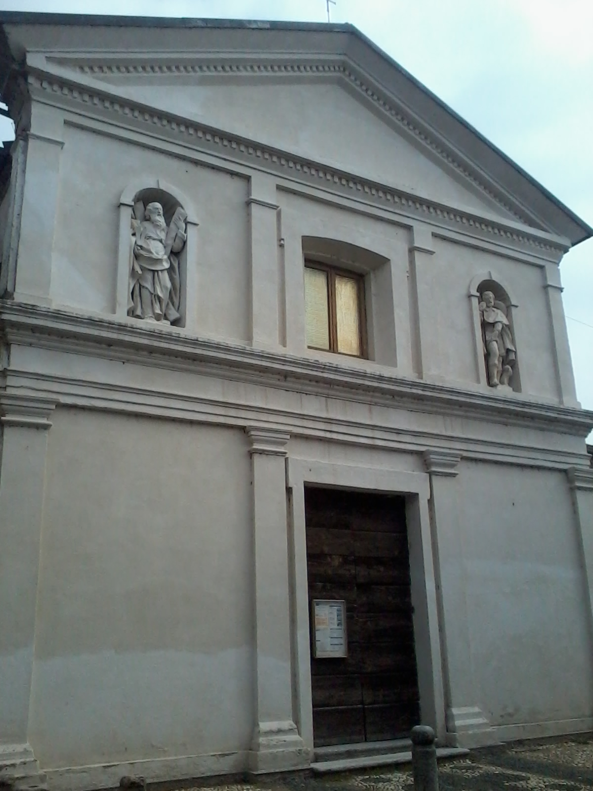 Chiesa dei Santi Andrea e Rocco a Fagnano, Gaggiano (MI) - Italy